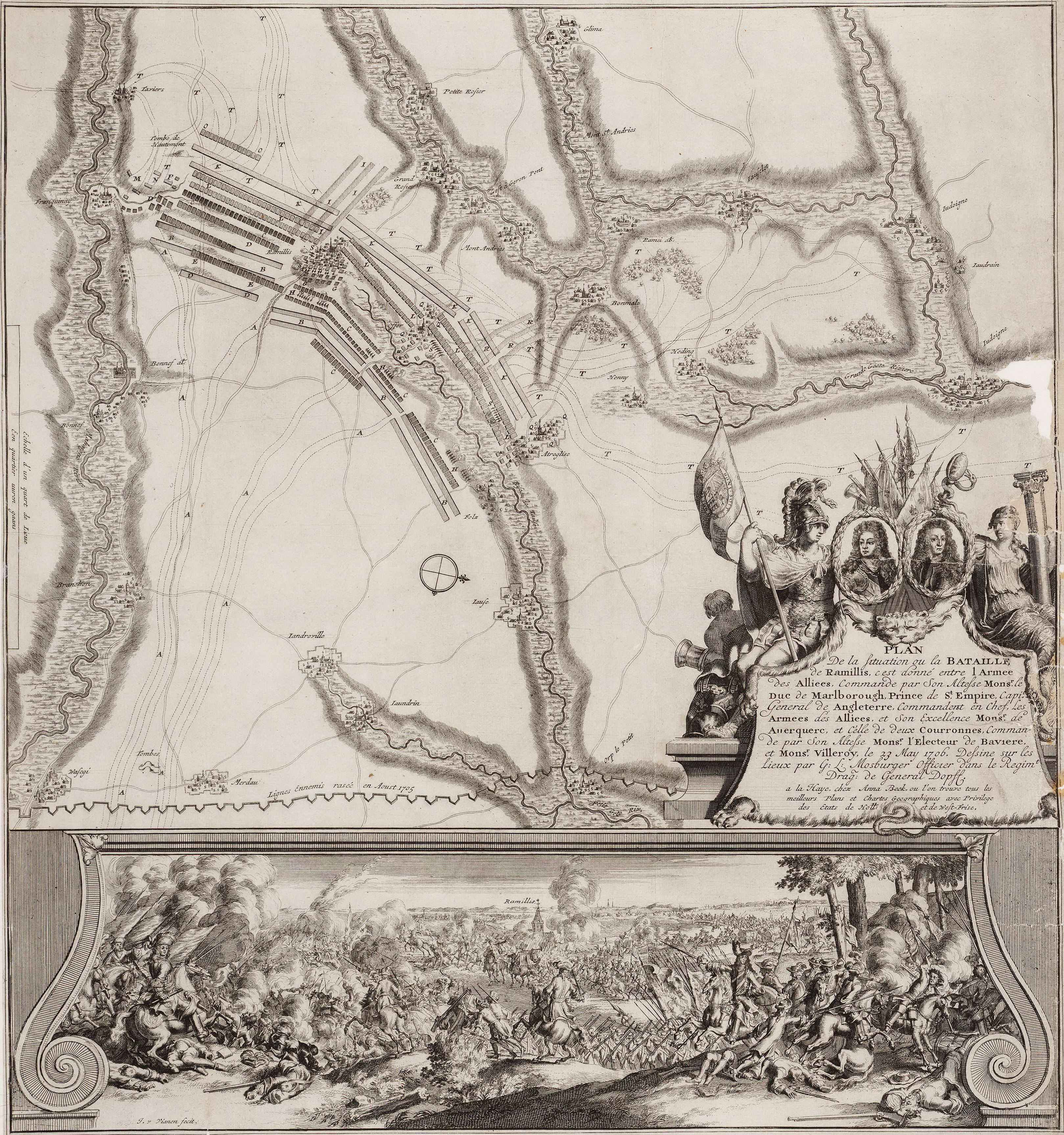 Plan de la situation ou la bataille de Ramillis,... / dessine sur les lieux par G.L. Mosburger ; J. v. Vianen fecit. 1706 à la Haye : chez Anna Beek.